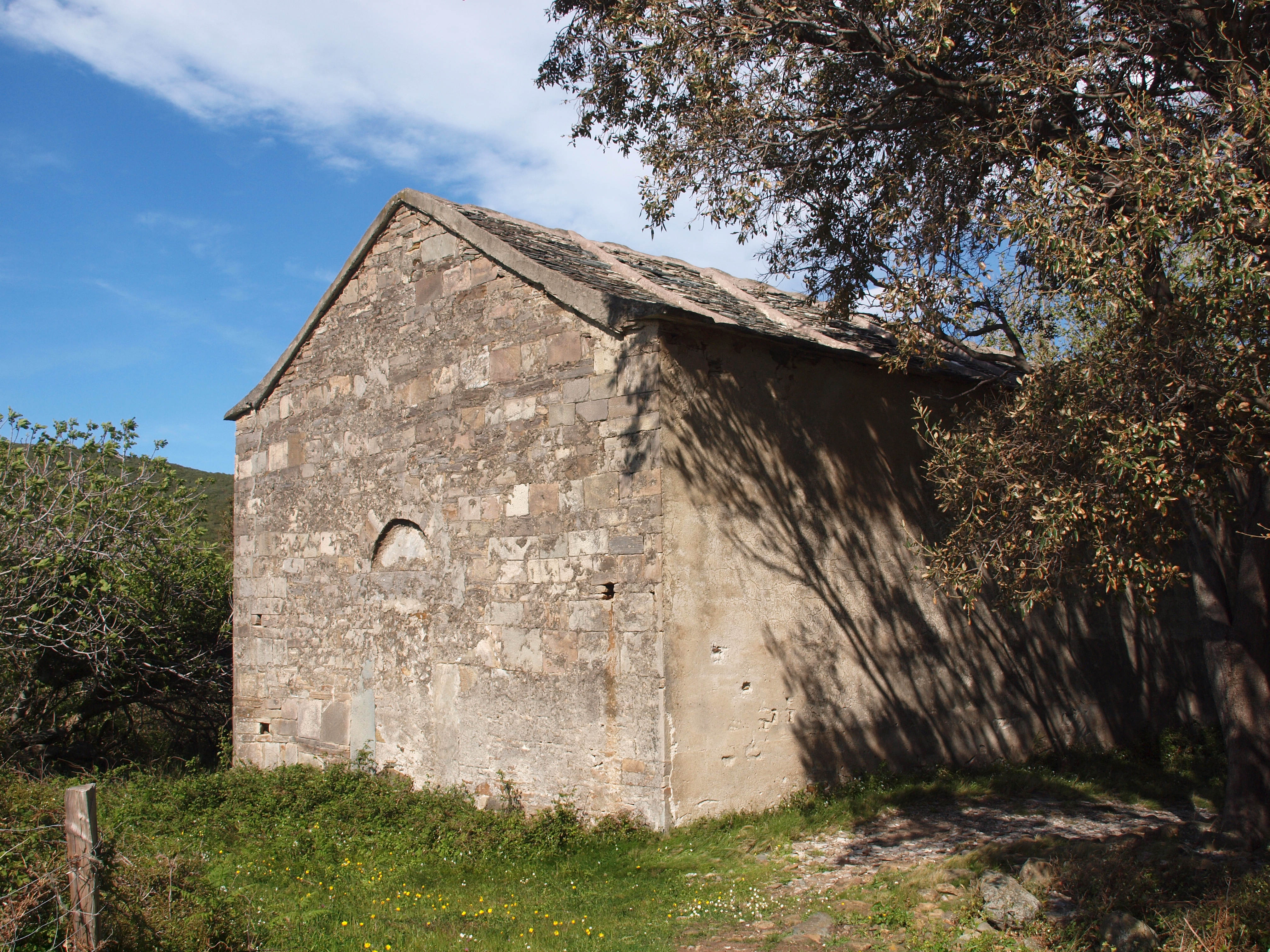 Sisco, Cap Corse (Corse) - Façade occidentale de la chapelle San Giuvanni au lieu-dit Pieve